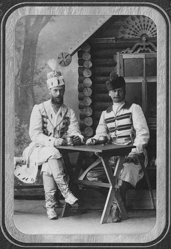 Великий князь Сергей Александрович с адъютантом Балясным в русских костюмах.